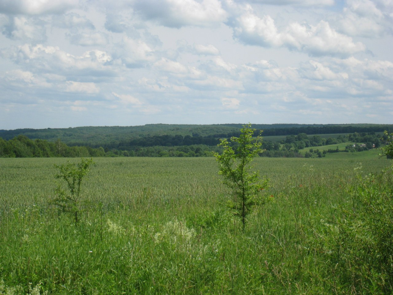 ЛІс коло села Варенка